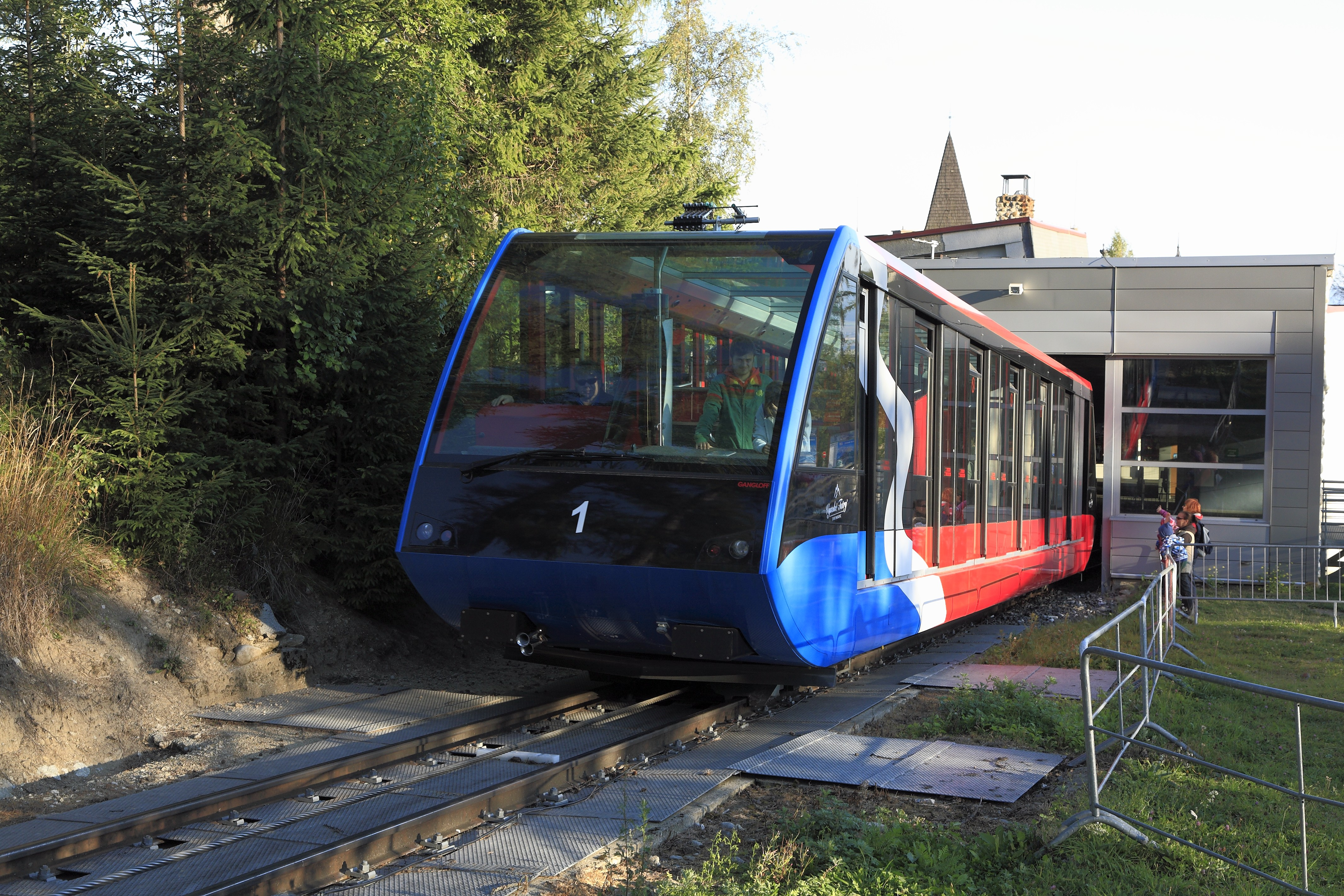 Der Wagen verlässt bergfahrend die Bahnsteighalle. Die neuen Wagen wurden im Zug der Modernisierung der Seilbahntechnik durch Doppelmayr/Garaventa im Jahr 2007 von Gangloff geliefert. Ihre größere Breite erforderte eine Anpassung der Bahnsteighallen.